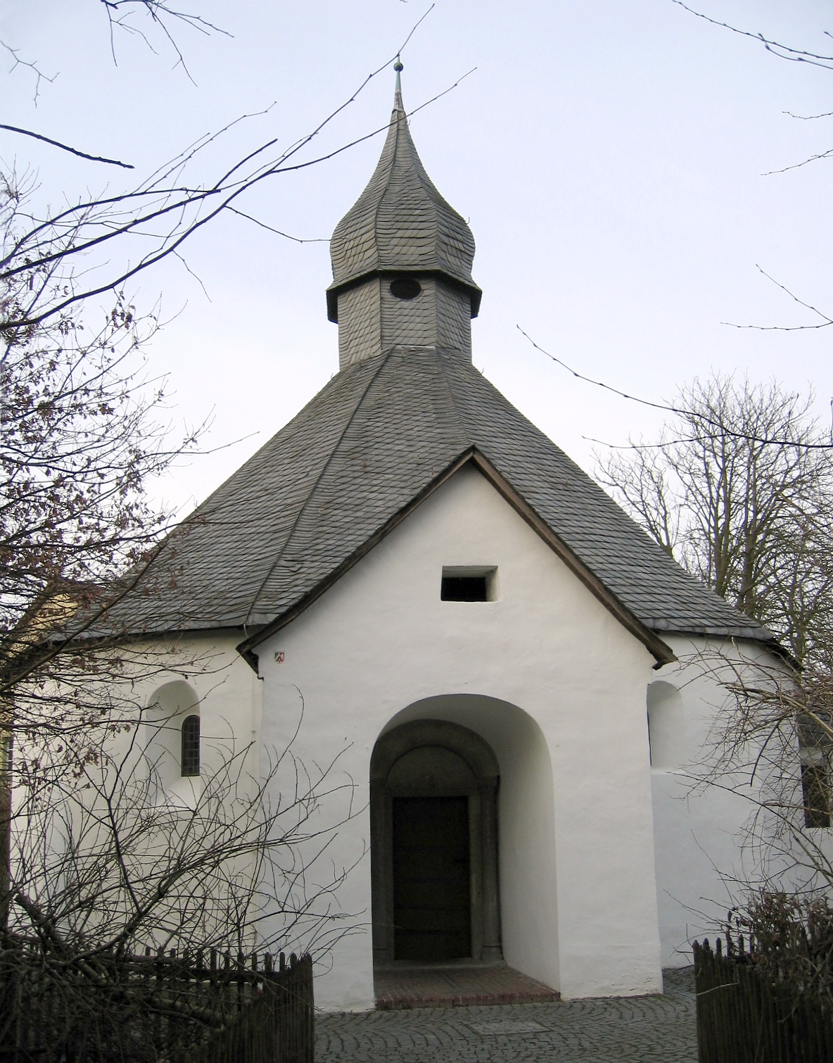 Unter Denkmalschutz stehende „Drüggelter Kapelle“ im Ortsteil Delecke der Gemeinde Möhnesee.